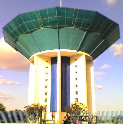 Chateau d'eau de Zinder